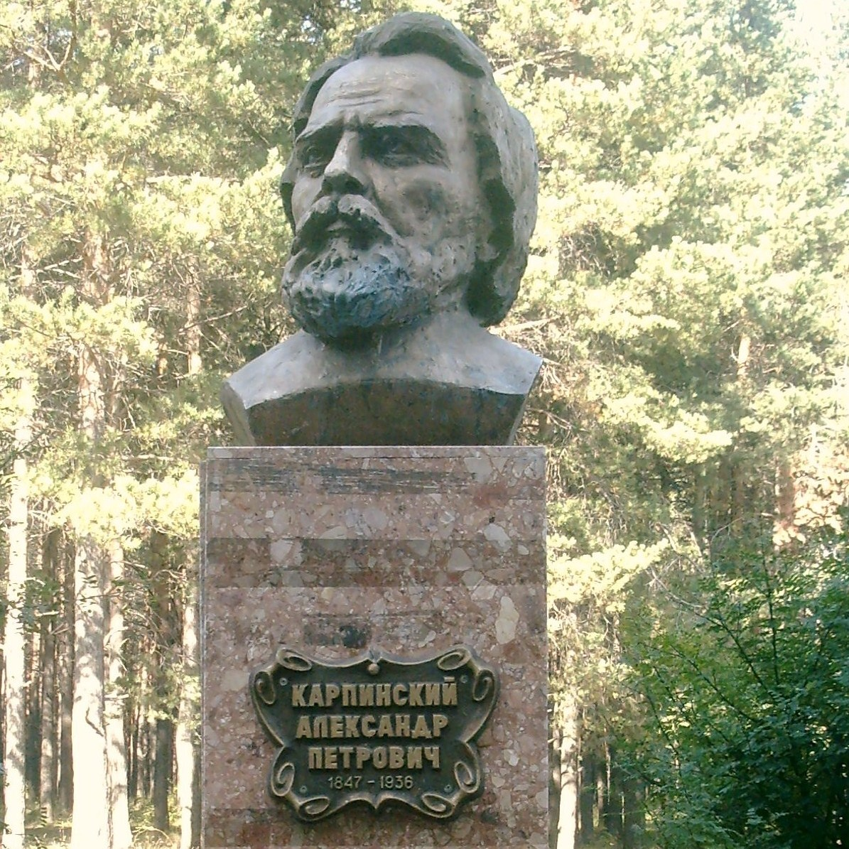 Памятник-бюст А. П. Карпинскому в городе Карпинске